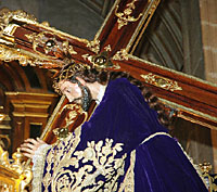 Imagen de Nuetro Padre Jesus Nazareno de Jaén, España.